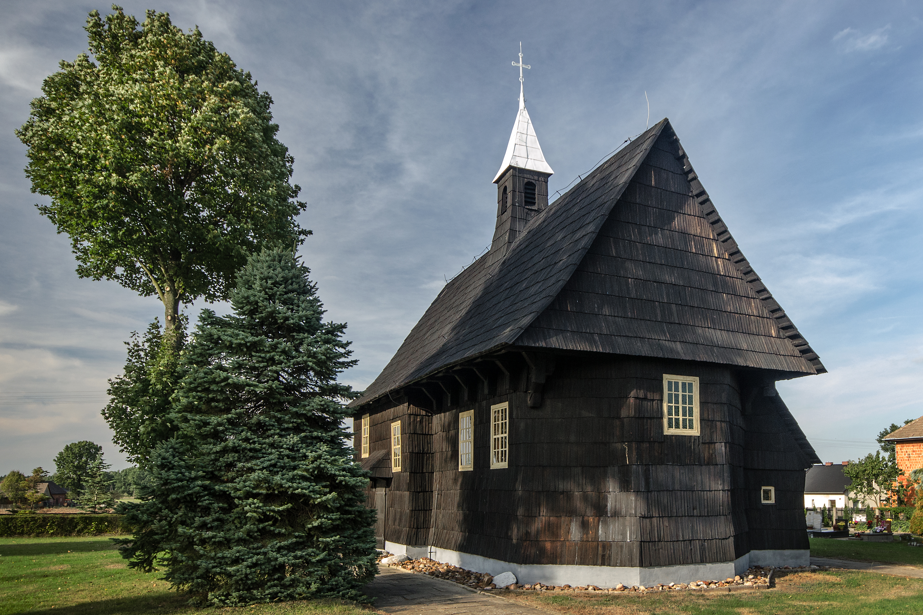 Sowczyce, kościół fil. pw. św. Antoniego, 1586